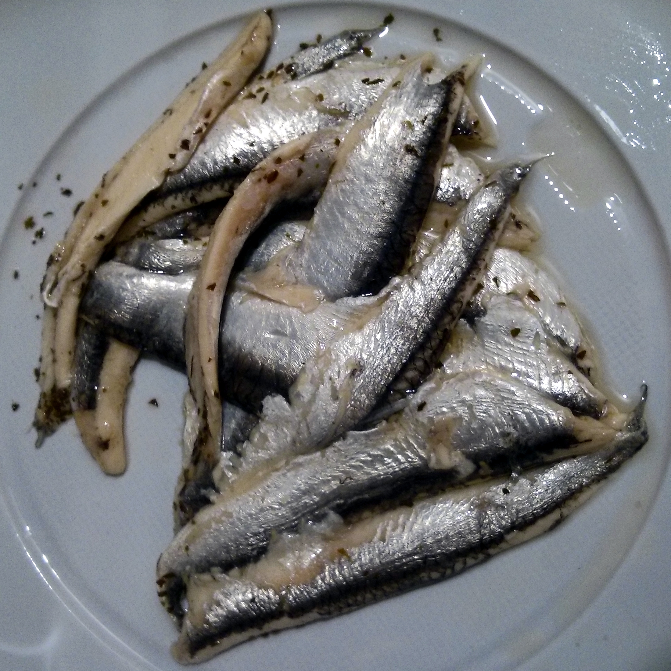 Fileti sardona v sončničnem in oljčnem olju. Engraulis encrasicolus.